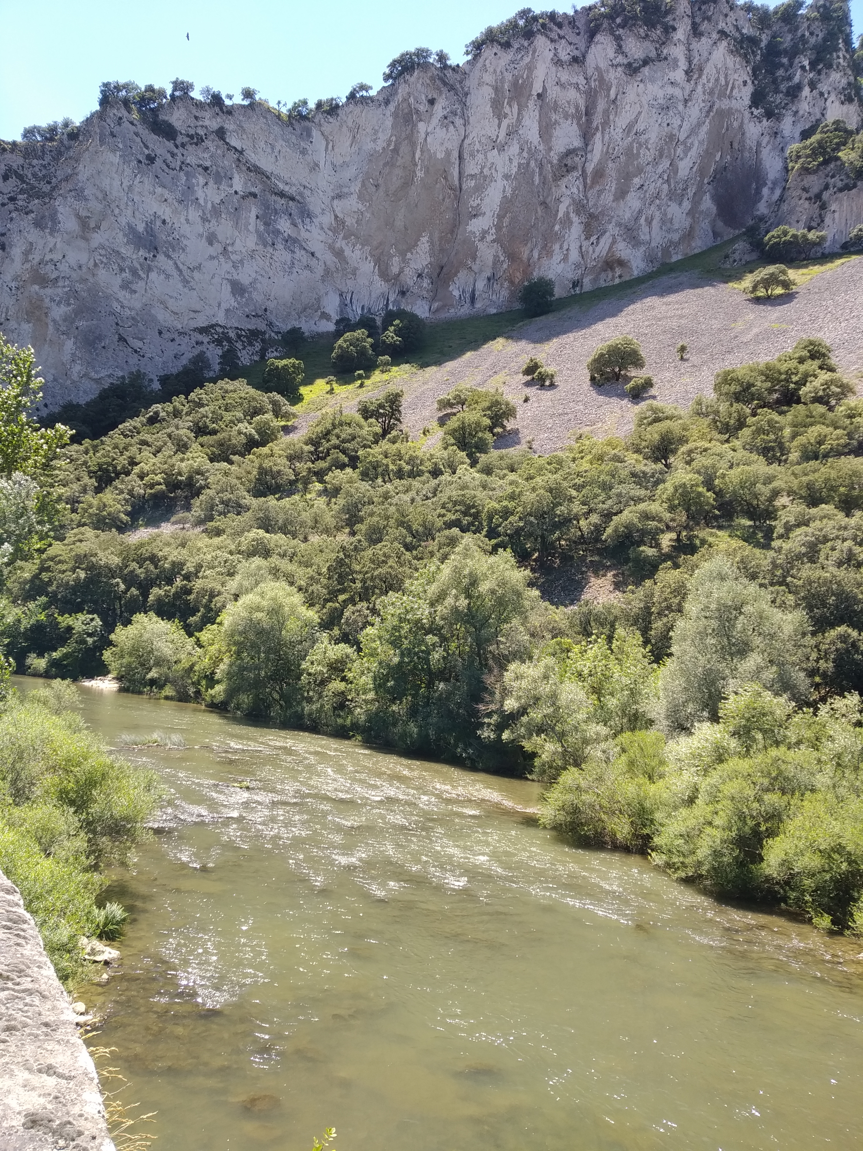 Arakil ibaiko zintzurra